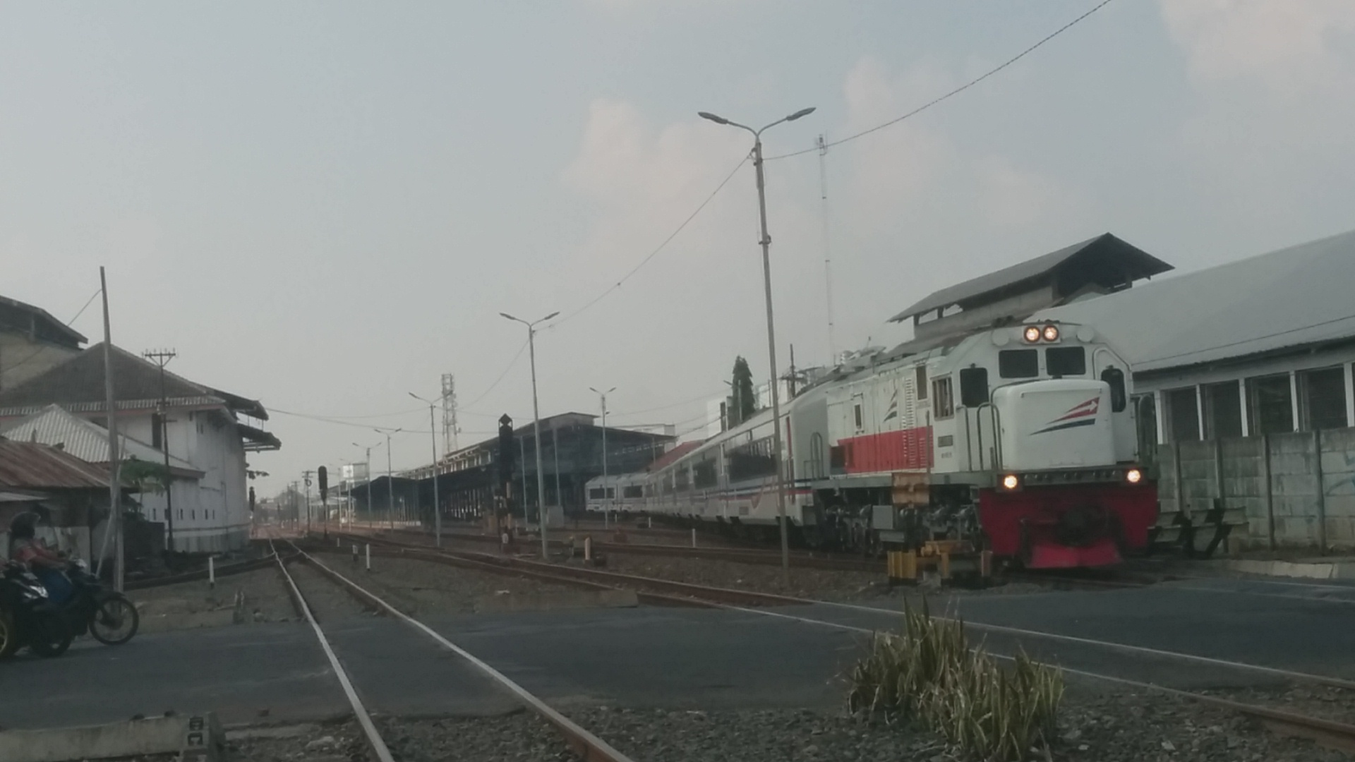 Kereta api Kaligung berangkat Stasiun Semarang Poncol.